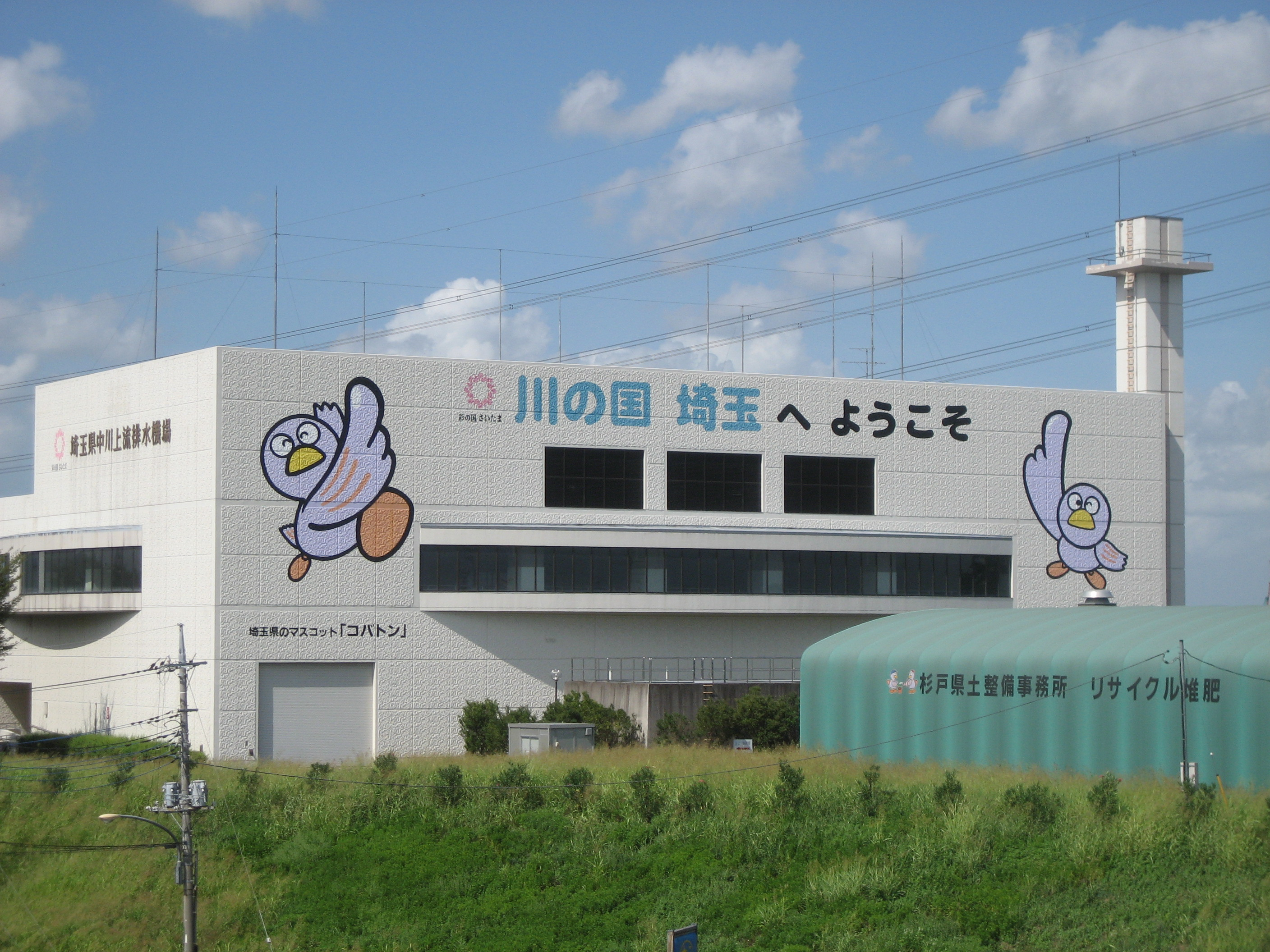 埼玉県幸手市にある埼玉県中川上流排水機場（建物及びコバトンの壁画）